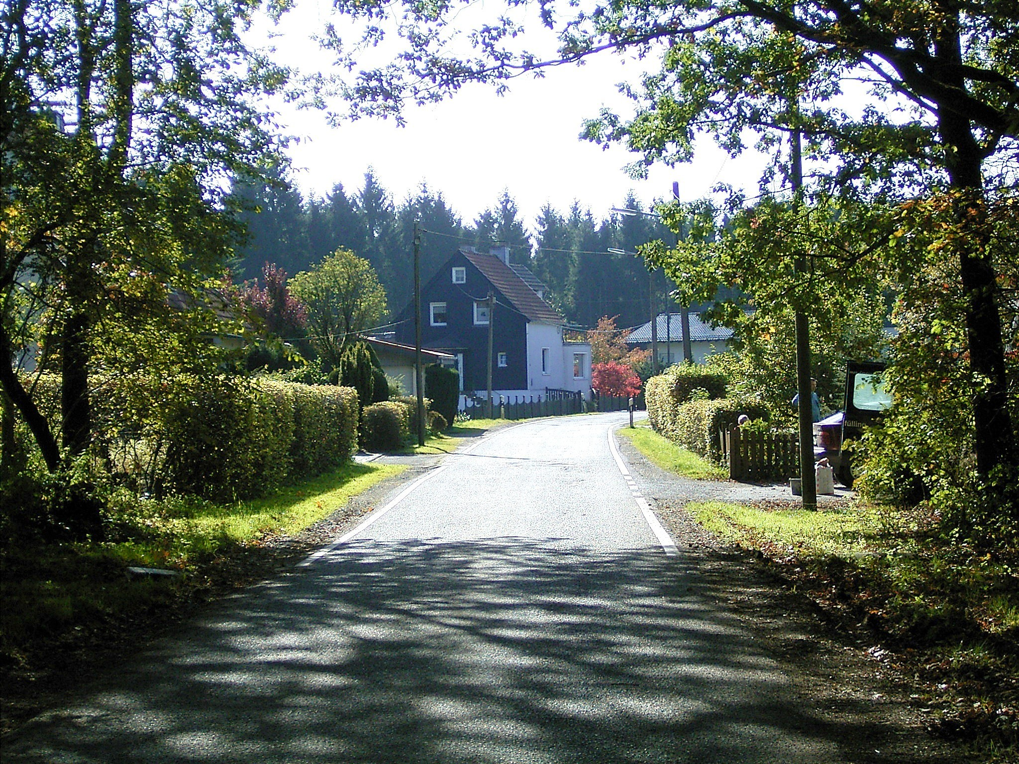 Radevormwald